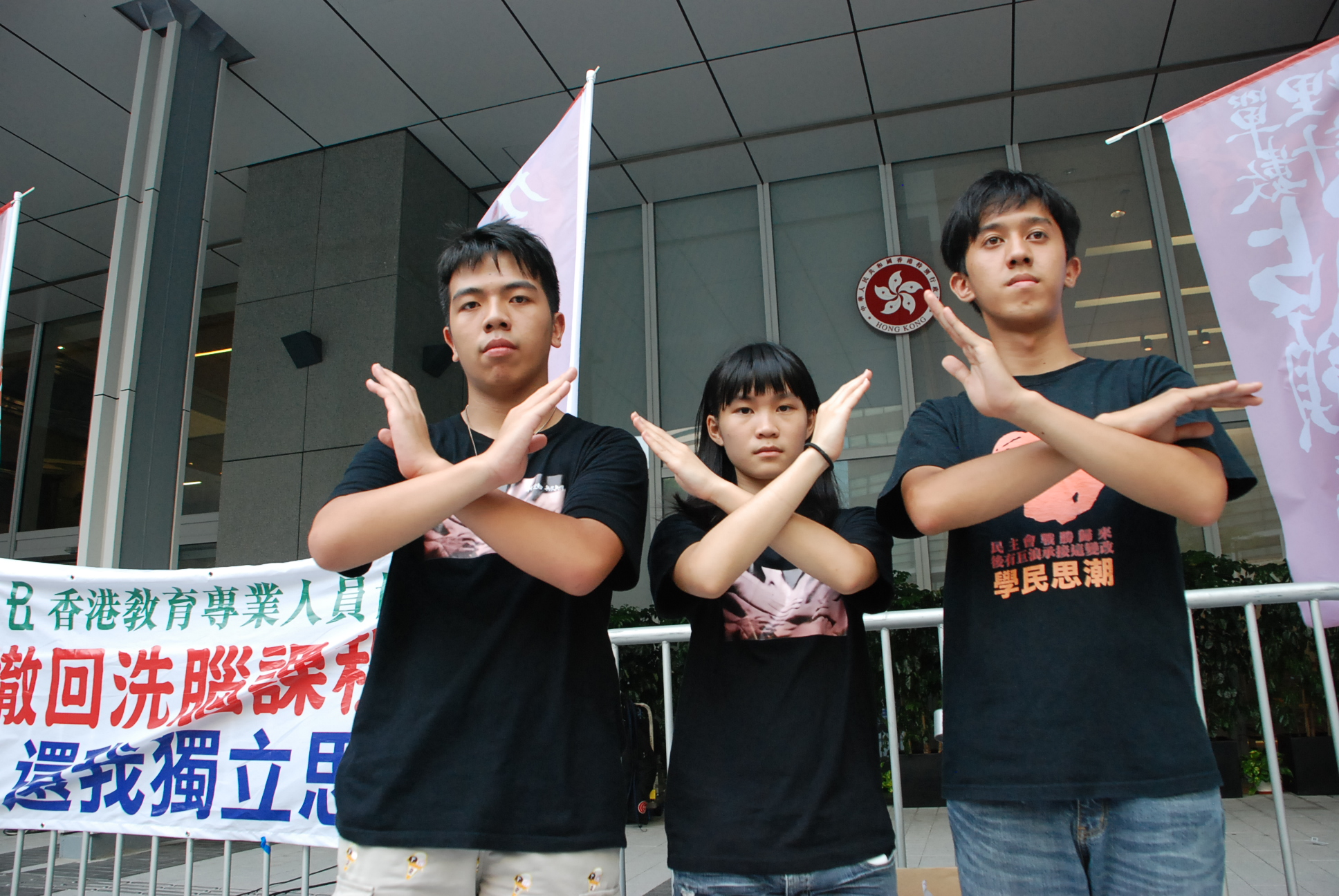 三名學民思潮學生代表(左起)林朗彥、黃莉莉、凱撒，星期四下午開始絕食，要求當局立即撤回國民教育科。